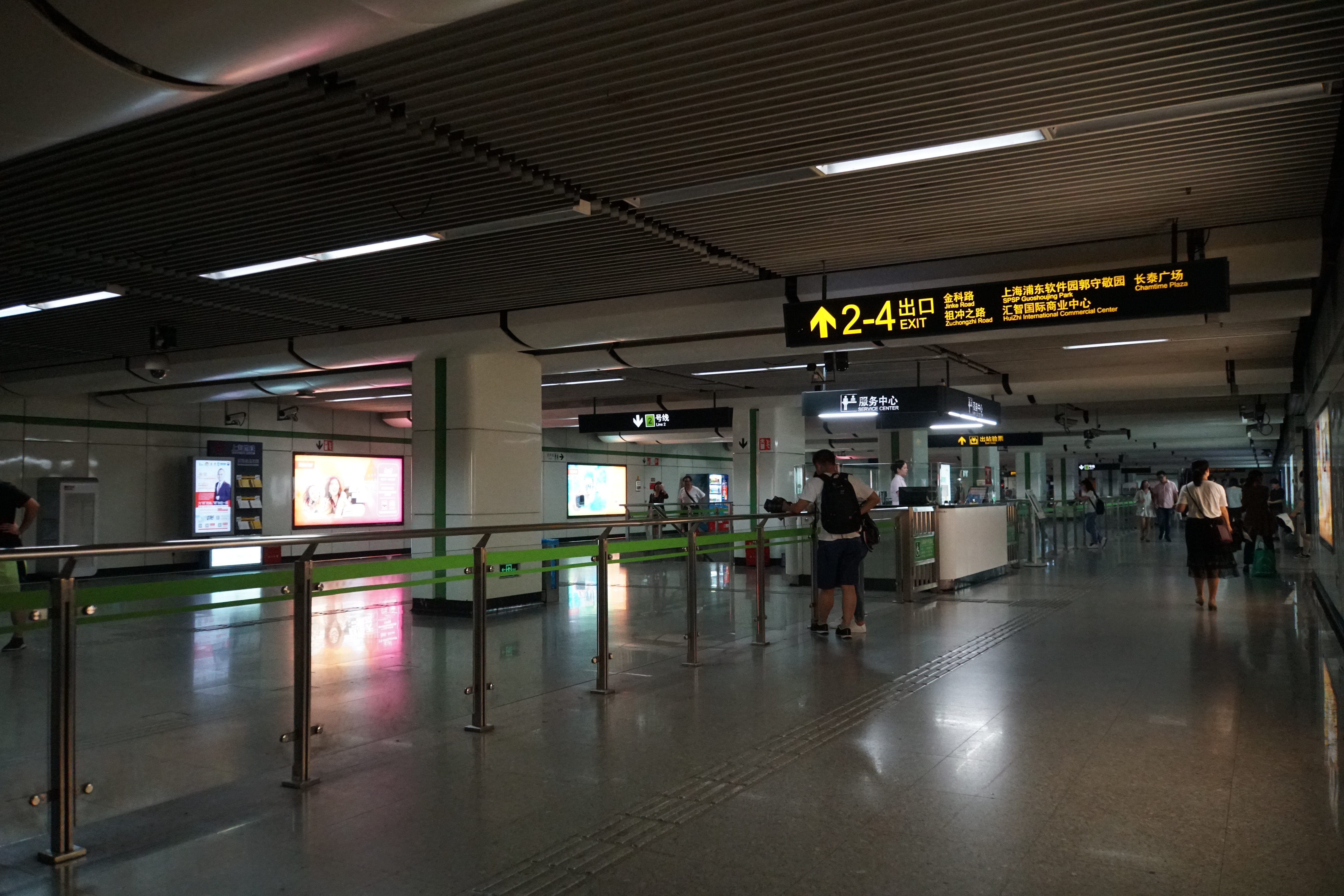 金科路站站厅